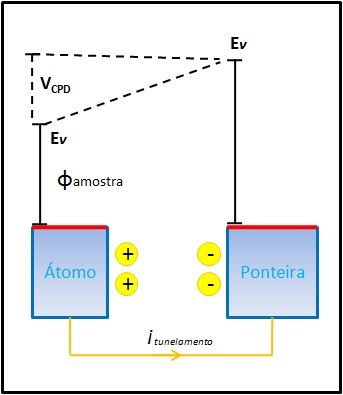 Polarização da ponteira e da superfície da amostra com formação do potencial contato e igualação dos niveis de Fermi devido á aproximação da ponteira com relação á superfície da amostra ocasionando uma corrente de tunelamento.